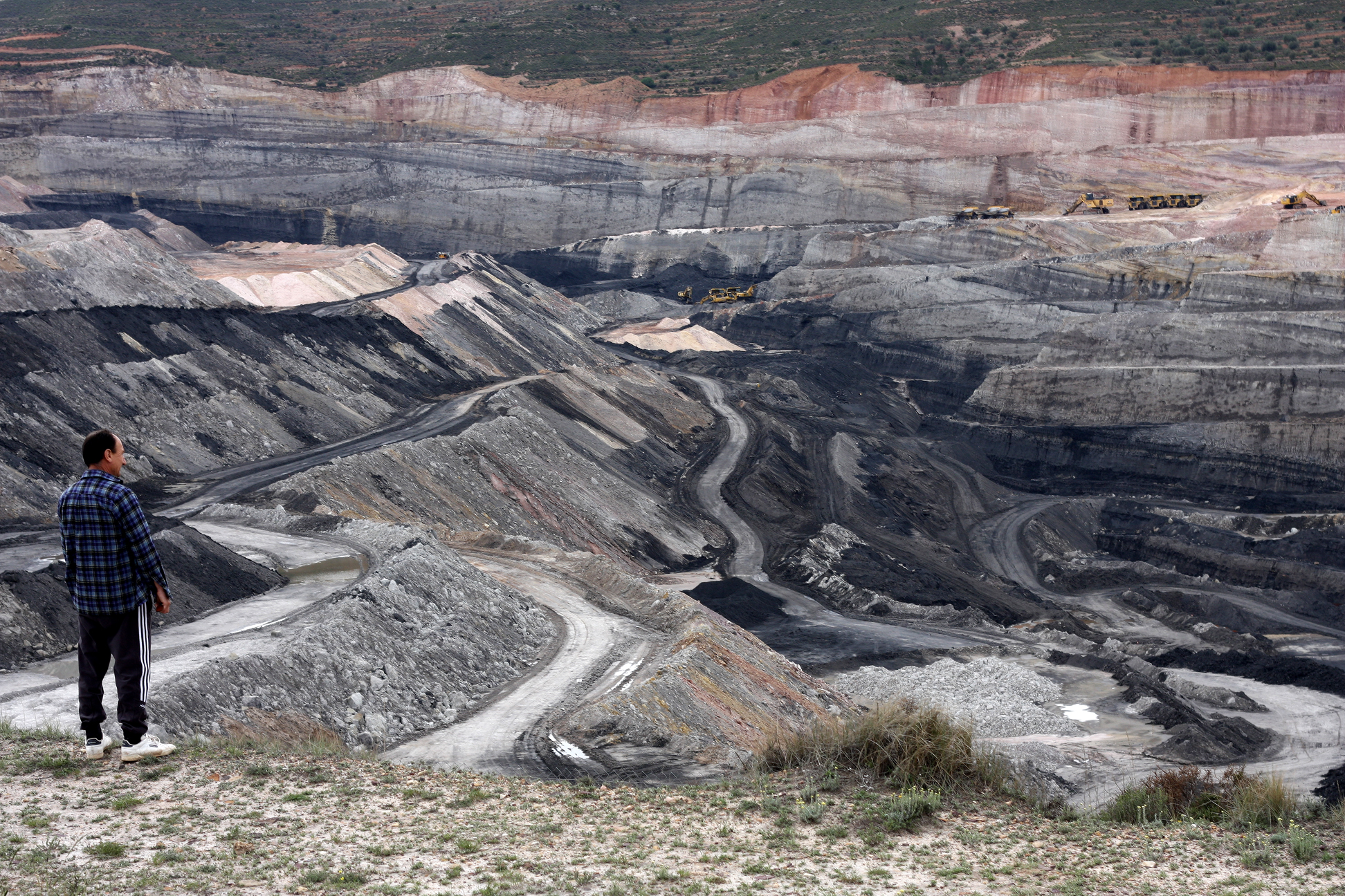 Estercuel, Teruel, Aragon.